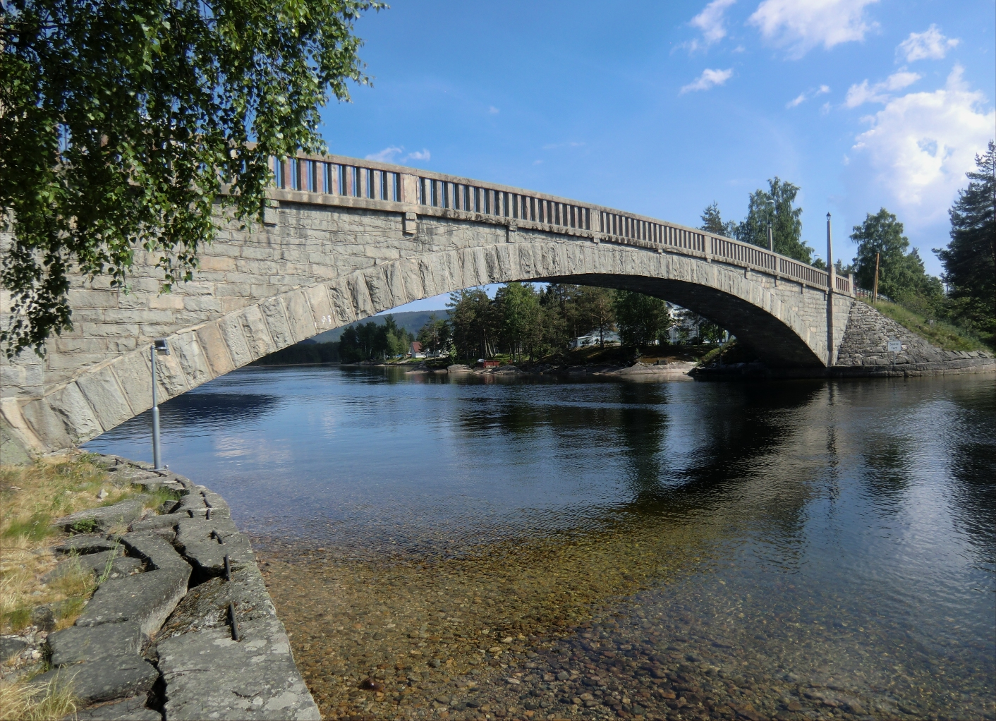 Treungen bru